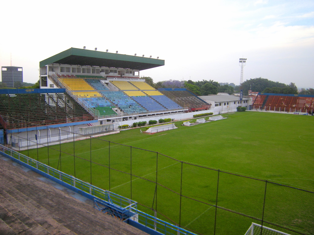 Estádio Antônio Lins Ribeiro Guimarães, conhecido como "Leão da Treze", em Santa Bárbara d'Oeste, SP.